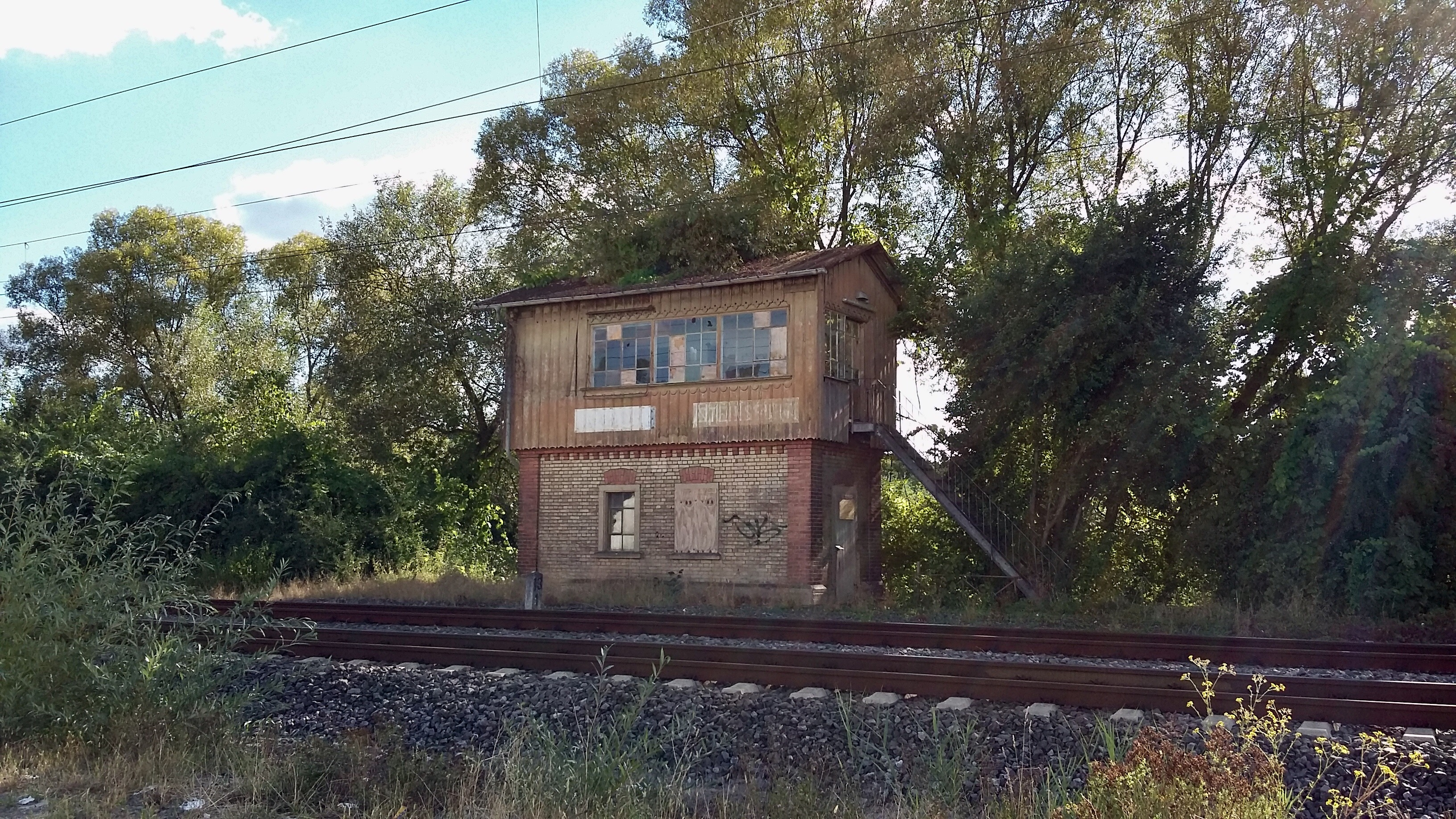 Das Stellwerk 2 in Steinsfurt, von der gegenüberliegenden Gleisseite aus gesehen.